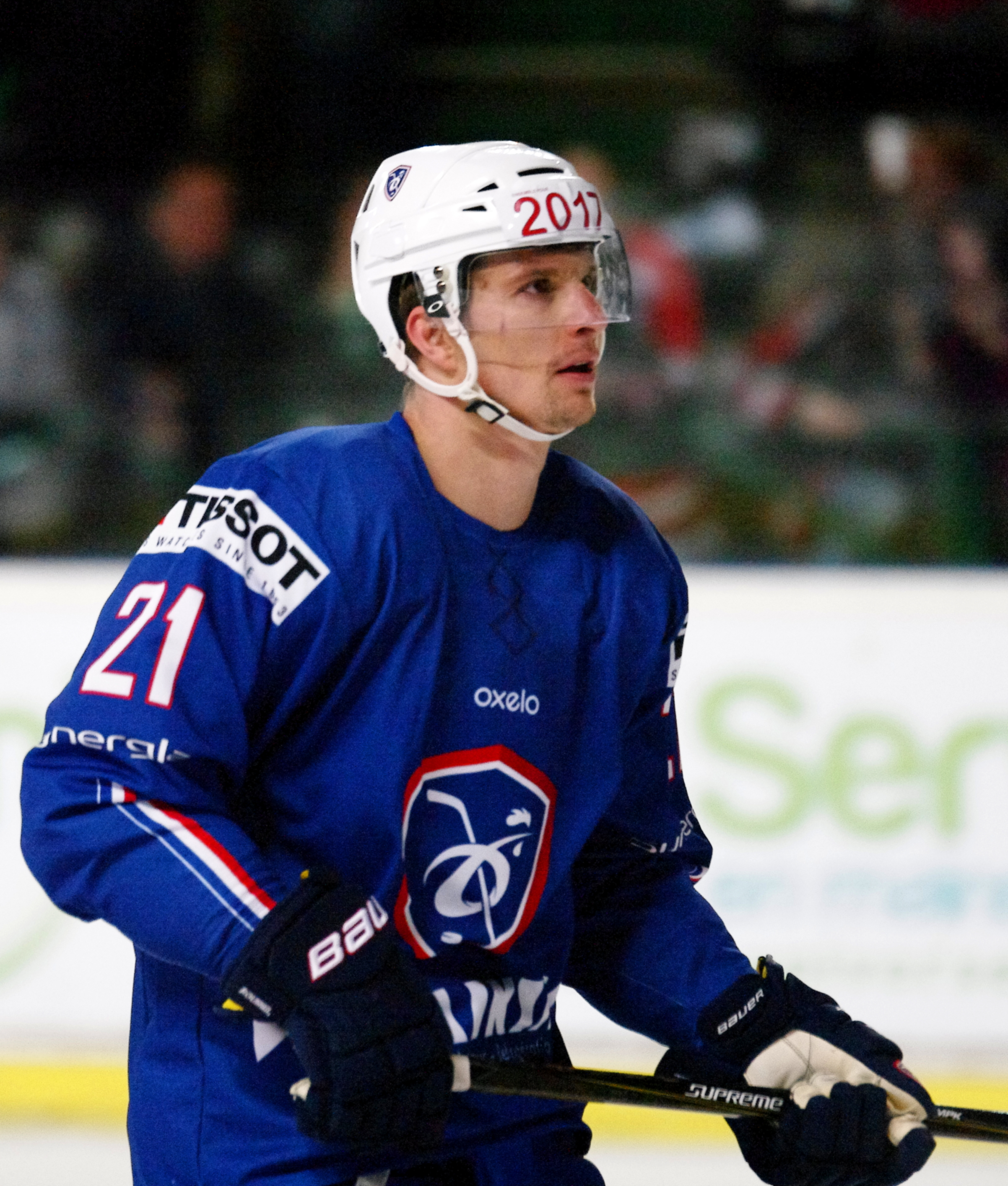 France vs. Biélorussie, 1er mai 2017